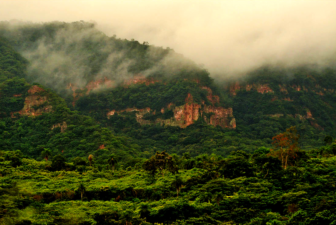 Descrição_para_sua_foto